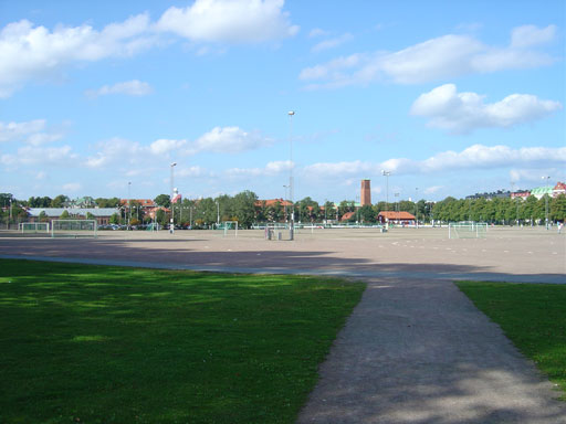 Heden, Göteborg, Sweden, 2006